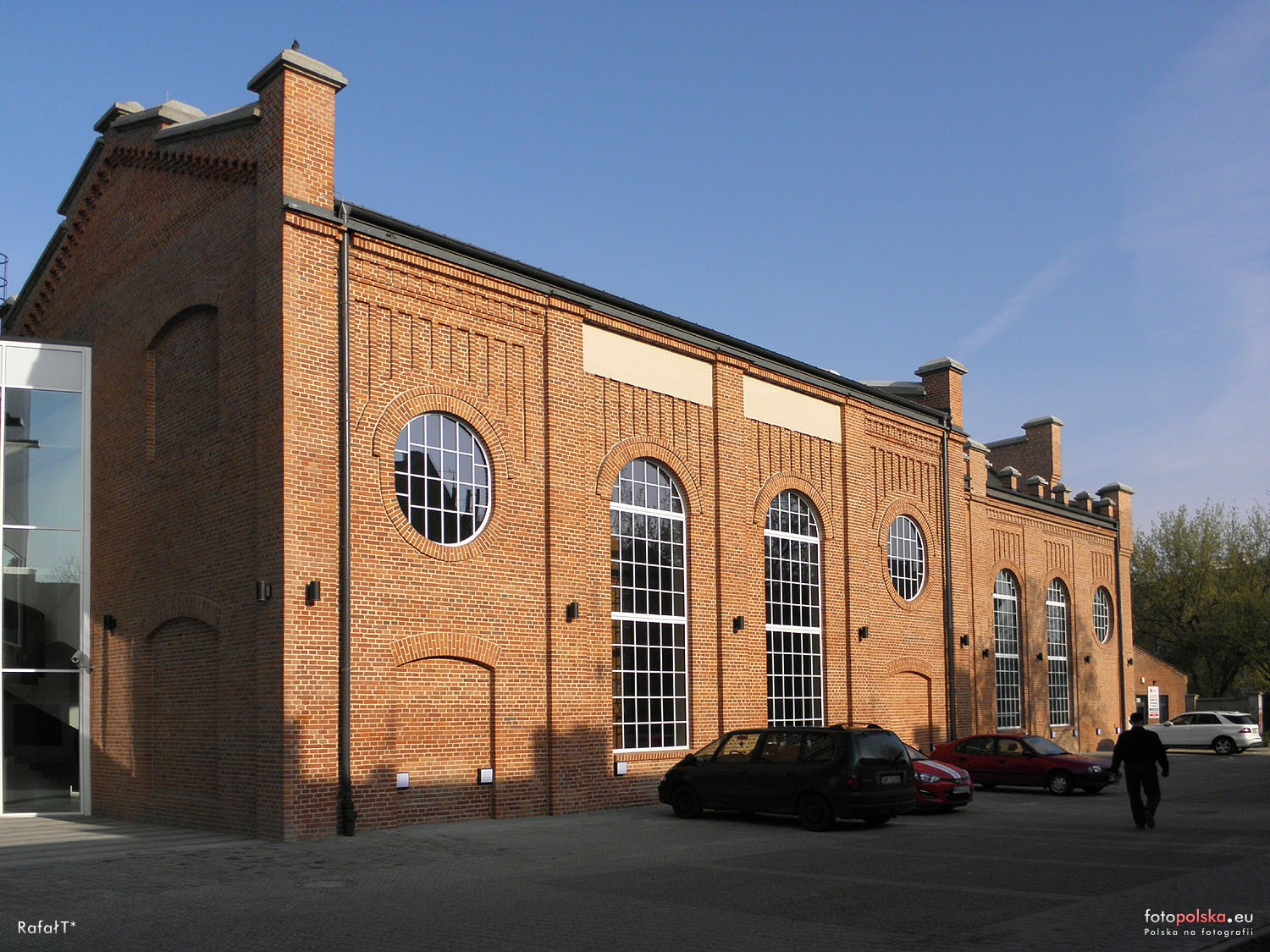 Budynek dawnej elektrowni zaadaptowany na centrum sztuki.